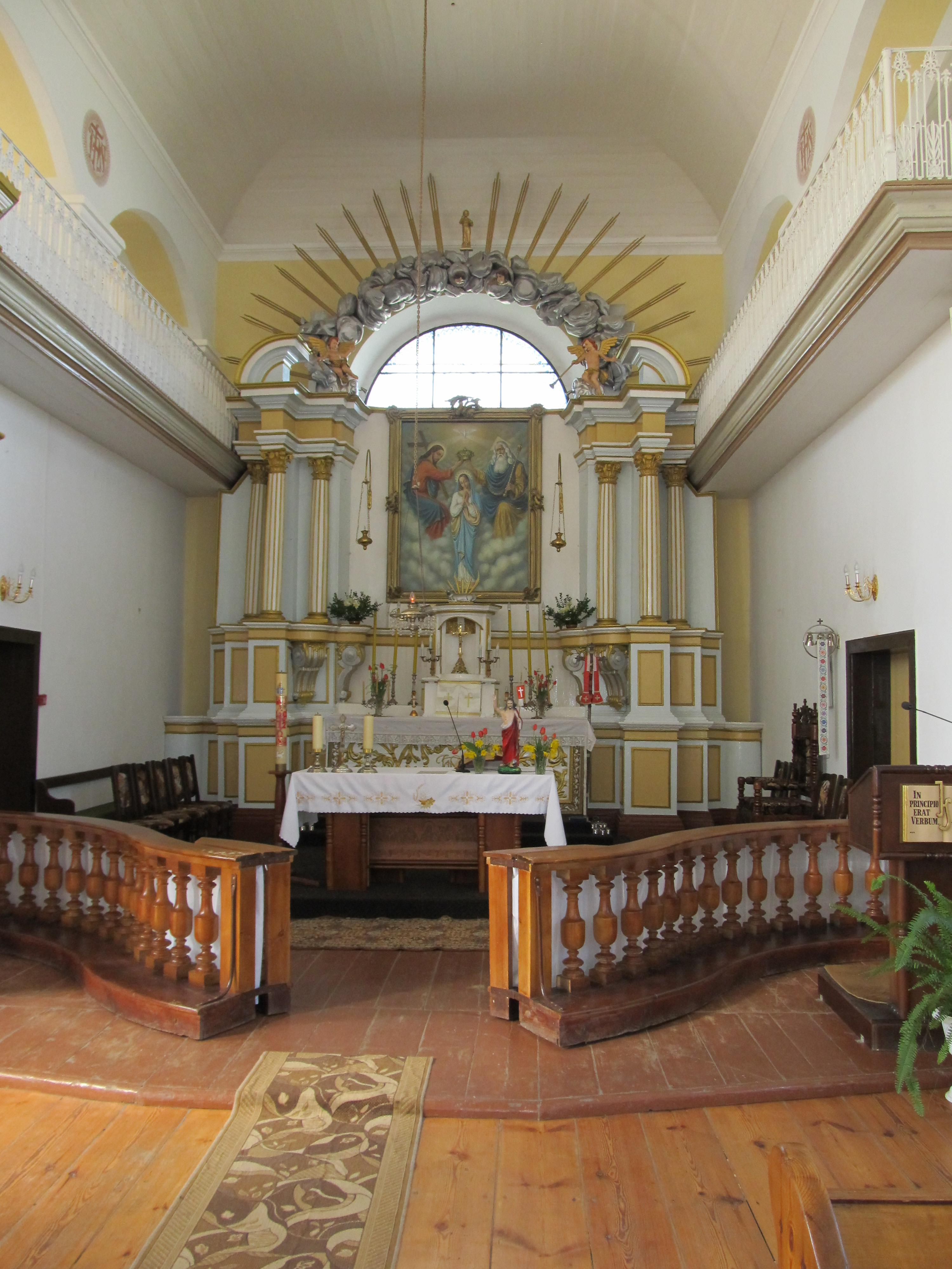 Беларуская (тарашкевіца): Касьцёл Найсьвяцейшай Тройцы (Шарашоў) This is a photo of Belarusian heritage monument. Reference number: 113Г000657 ( WLM)